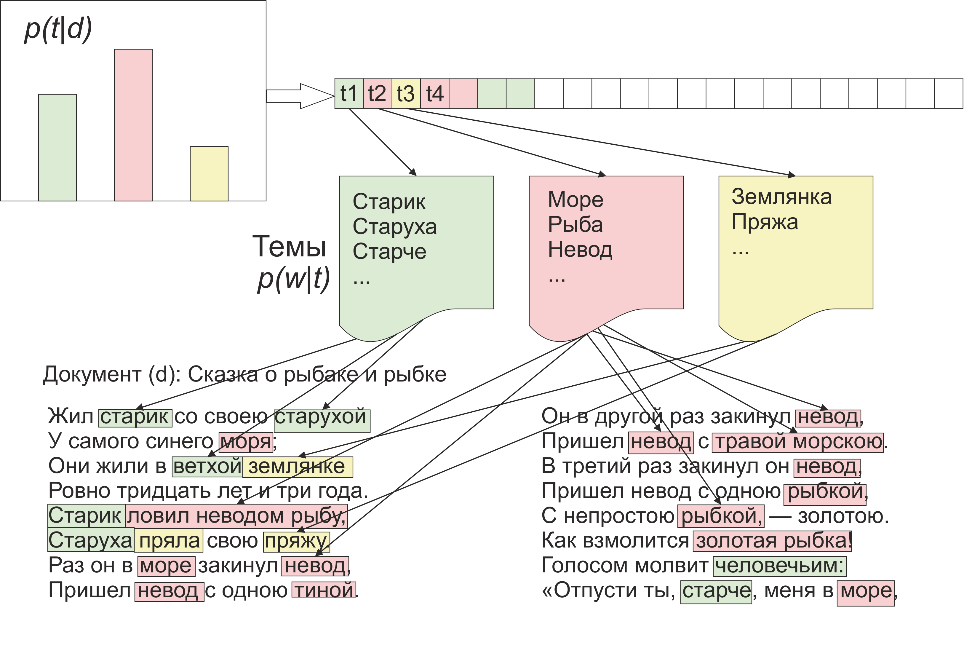 Построение тематической модели документа: p ( w | t ) , p ( t | d ) {\displaystyle p(w|t),p(t|d)} искомые условные распределения d {\displaystyle d} - документ w {\displaystyle w} - слово d , w {\displaystyle d,w} - наблюдаемые переменные t {\displaystyle t} - тема (скрытая переменная)